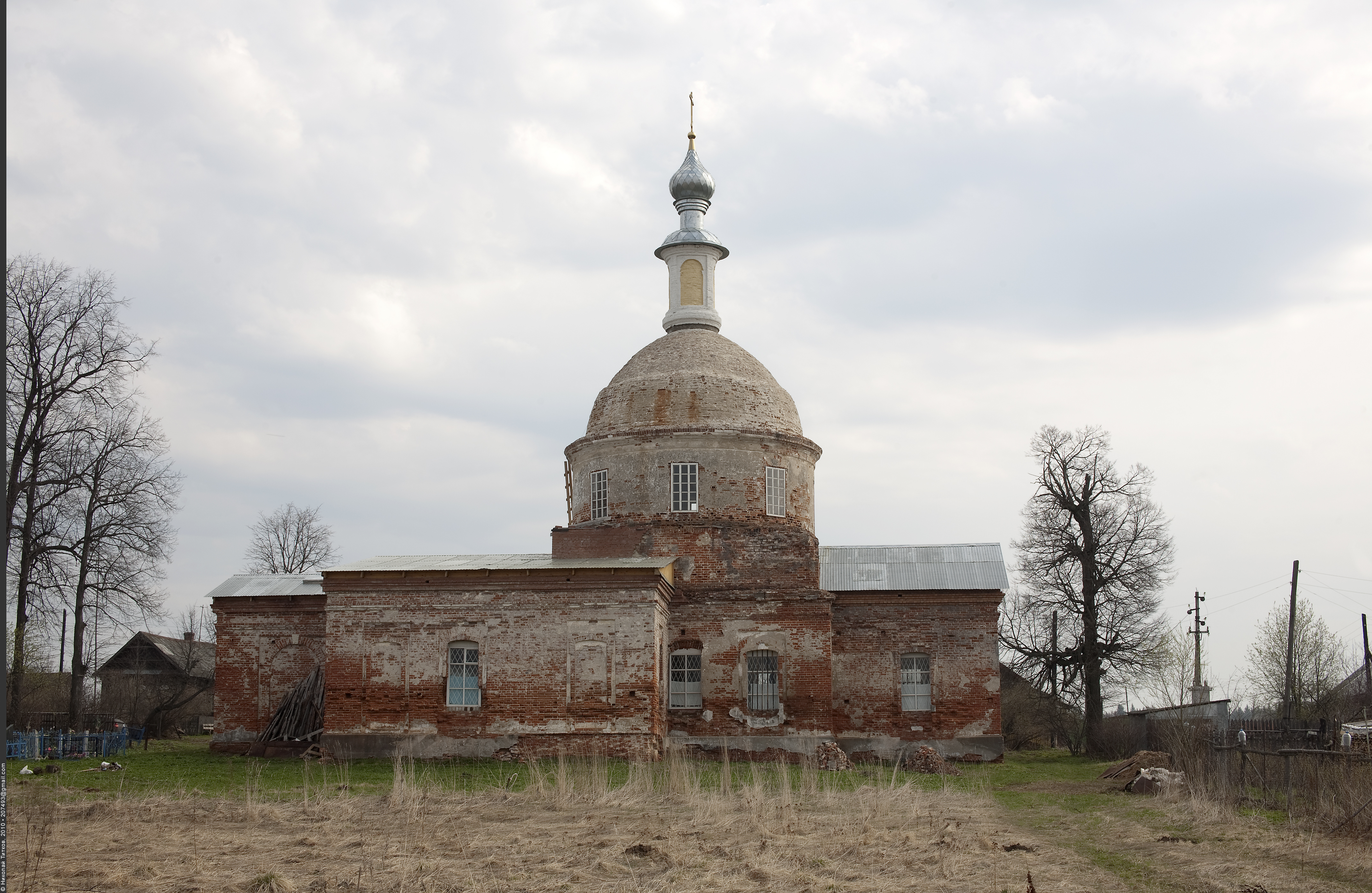 Храм Благовещения Пресвятой Богородицы в селе Семендяйка Переславского района Ярославской области